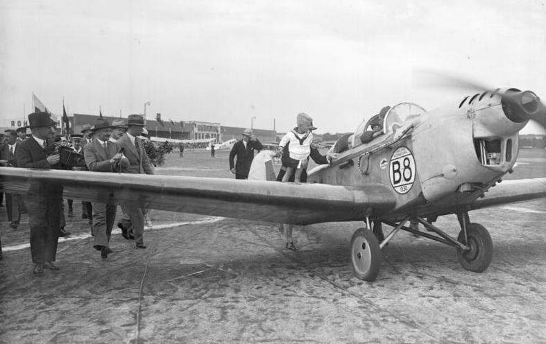 Die Ankunft der ersten Europa-Flieger auf dem Centralflughafen in Berlin-Tempelhof! Der siegreiche erste deutsche Europa-Flieger Poss während seiner Ankunft auf dem Centralflughafen in Berlin.